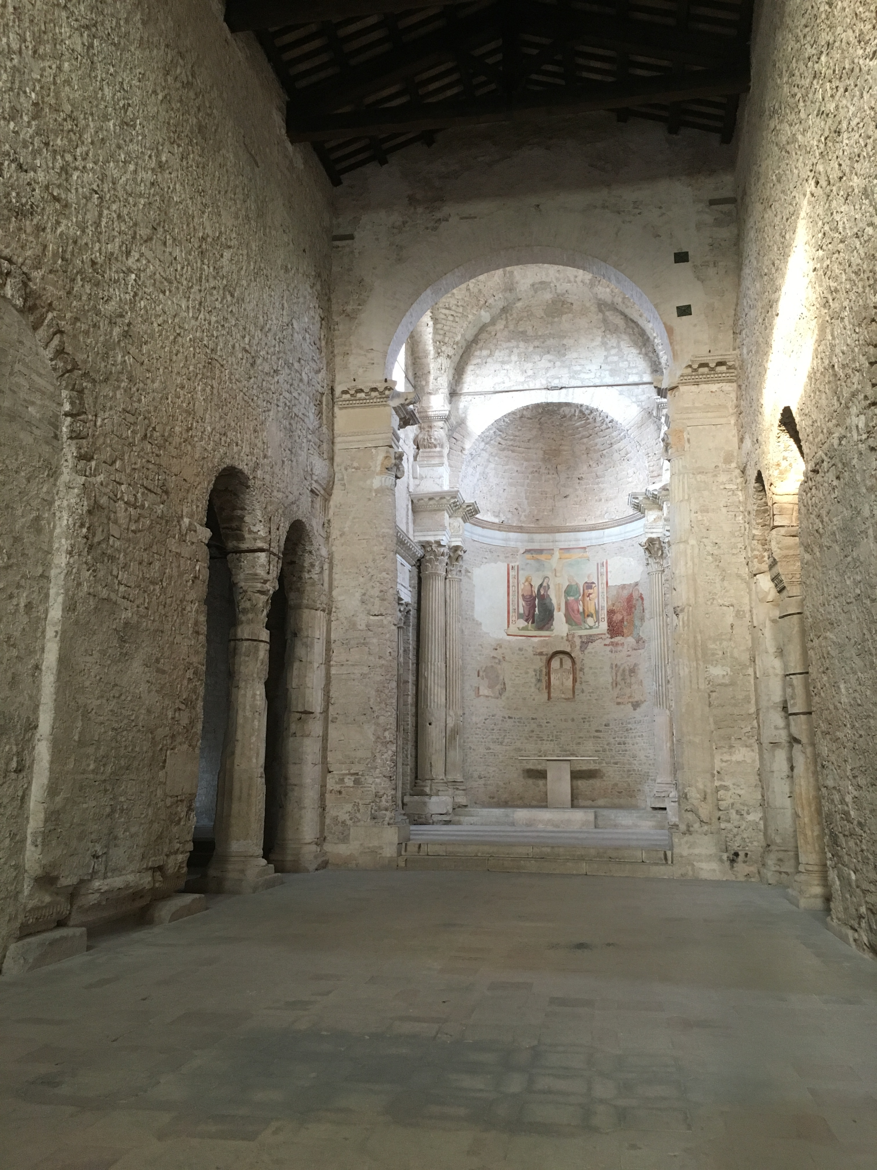 San Salvatore Spoleto